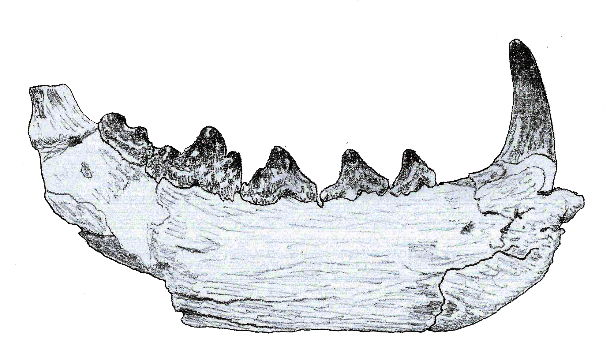 Mammacyon mandible